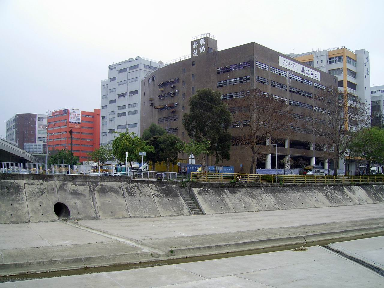 大圍一帶的工廠大廈